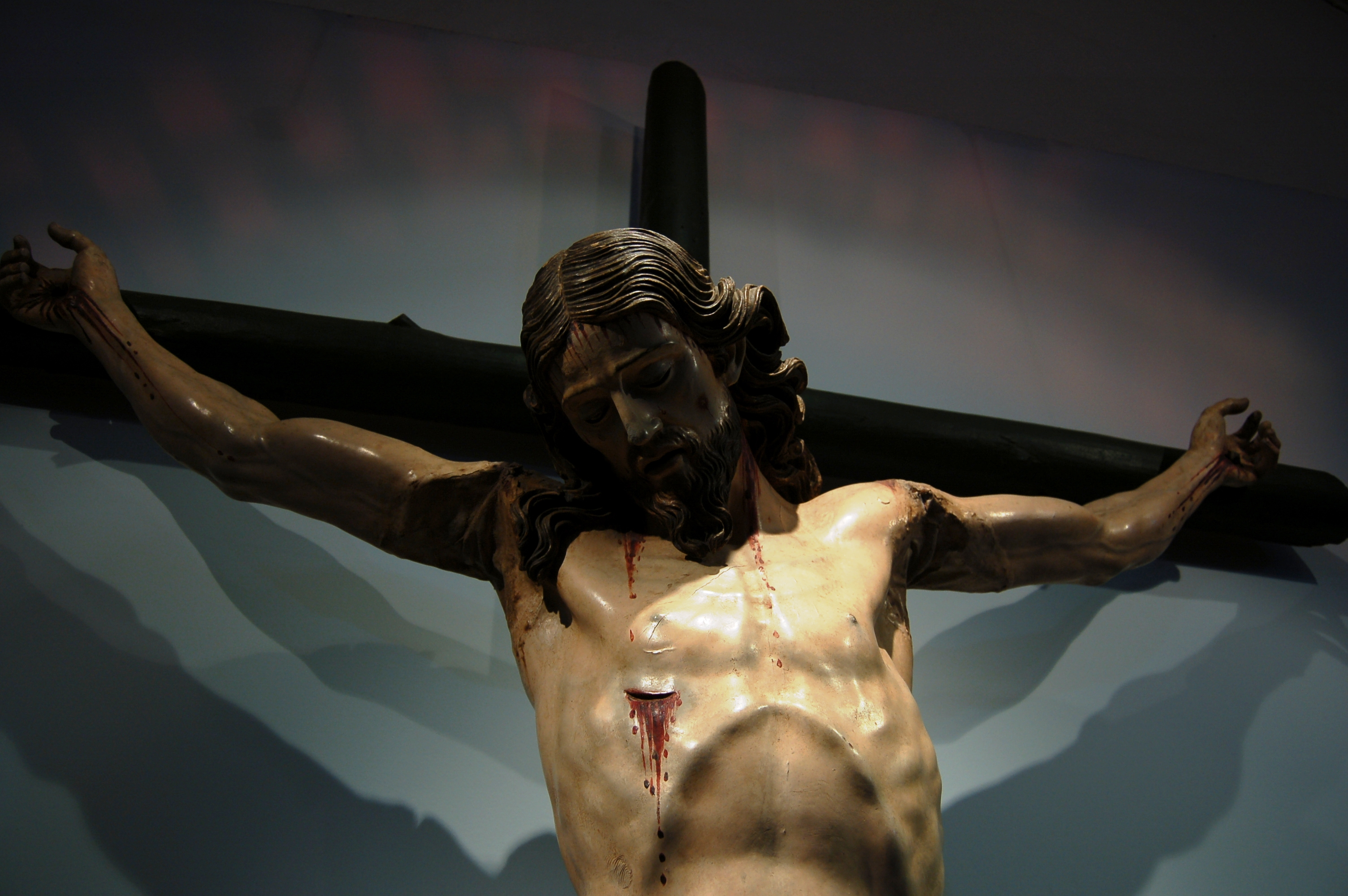 Cristo Crucificado de Xosé Ferreiro. Museo do Pobo Galego. Santiago de Compostela.